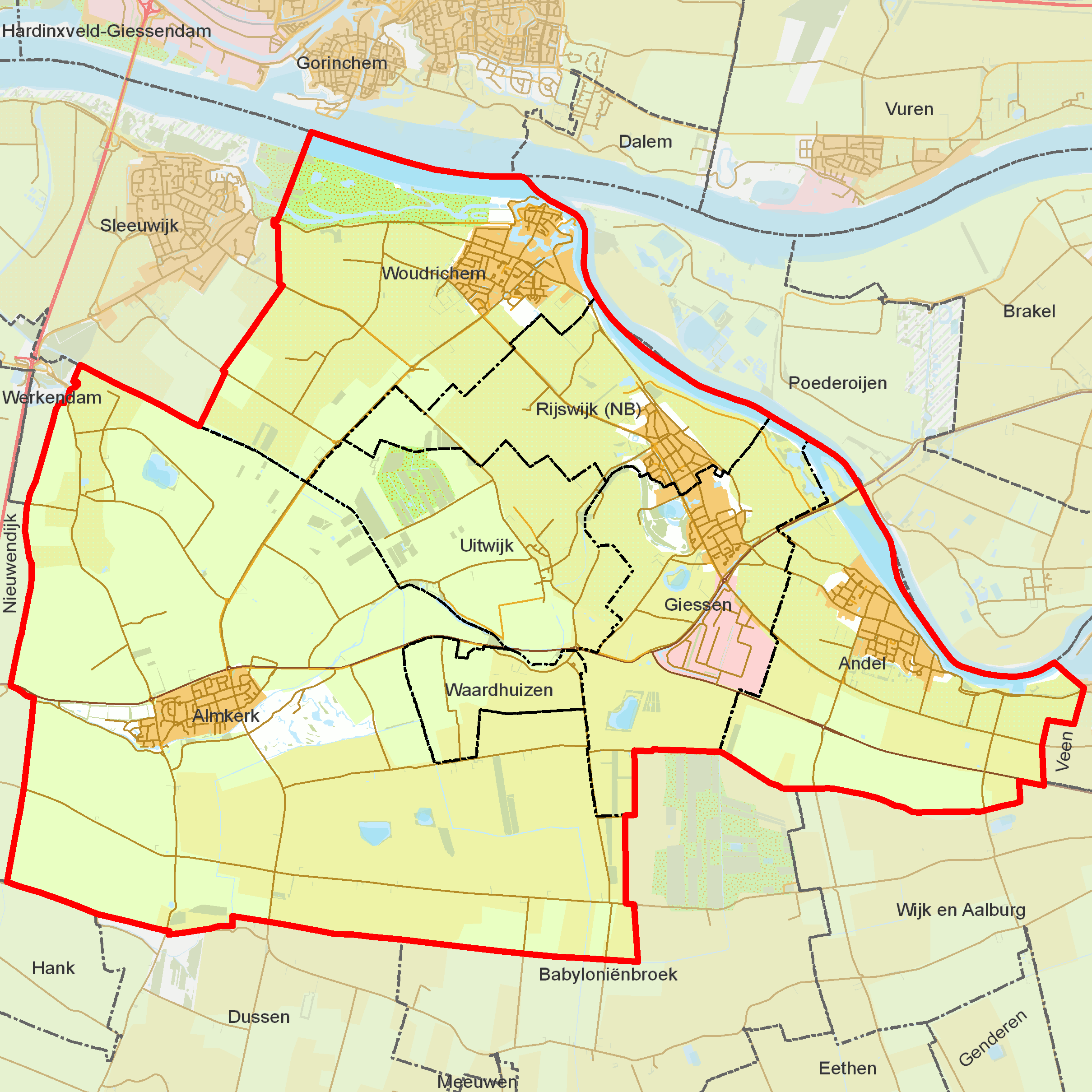 BAG woonplaatsen - Gemeente Woudrichem.png